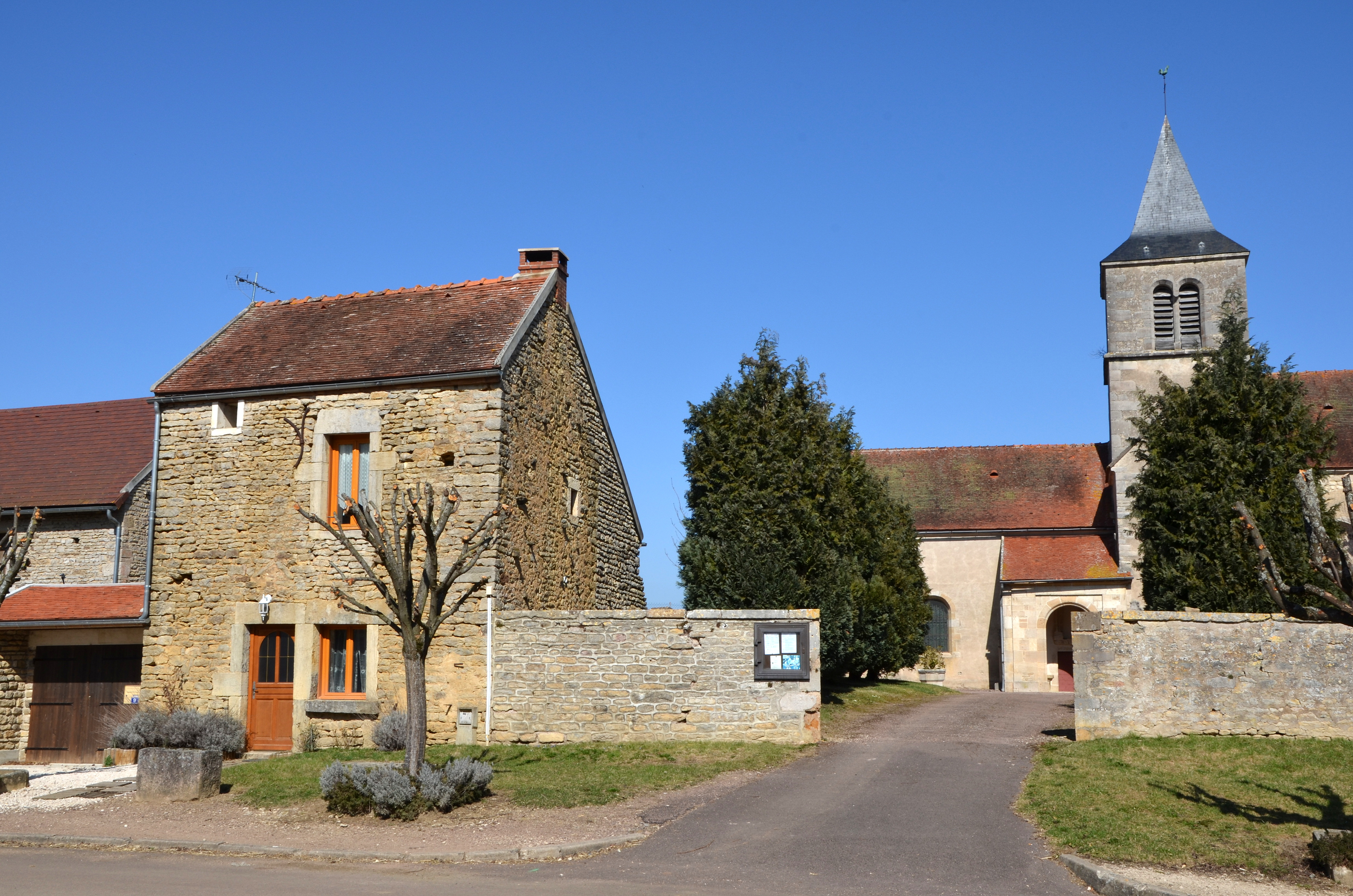 Marigny le Cahouët , Côte d'Or, Bourgogne, France